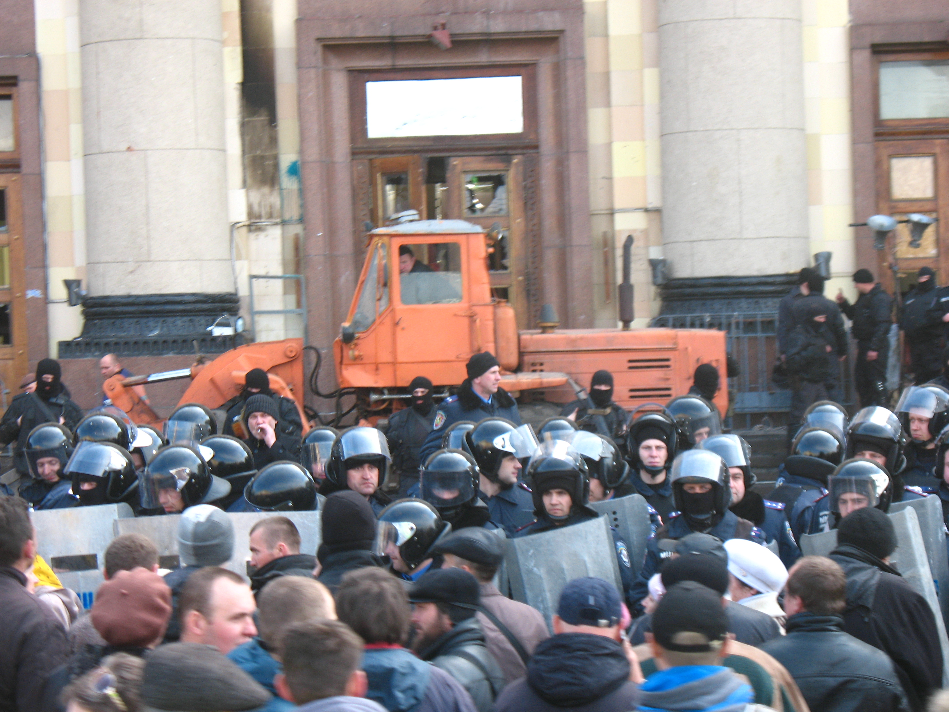 ХОГА сразу после штурма "Ягуаром"/наёмниками. На проезжей части на переднем плане стоит антинационалистический митинг мирных горожан. Перед центральным входом - грейдер. В первом ряду оцепления стоит в основном харьковская милиция, сзади - шеренга людей (по версии Авакова - винницкий "Ягуар", по другим версиям - американские наёмники дочерней компании ЦРУ "Грейстоун") в новой форме спецназа МВДУ без единого опознавательного знака (шевронов, погон, знаков различия, нашивок, кокард, надписей), с АК и дробовиками, с подсумками с 4-5-ю магазинами, все в масках-балаклавах. В середине (левее между шеренгами) с сигаретой-"распорядитель". "В Харькове к утру 8 апреля наёмники из американской компании Greystone, переодетые «министром внутренних дел» Аваковым в форму винницкого спецподразделения «Ягуар», арестовали 64 безоружных (в суде выяснилось, что задержанных гораздо больше)." Станислав Минаков, Харьков, "Нет веры пролившим кровь." "Литературная газета", № 15 (6458) от 16 апреля 2014.